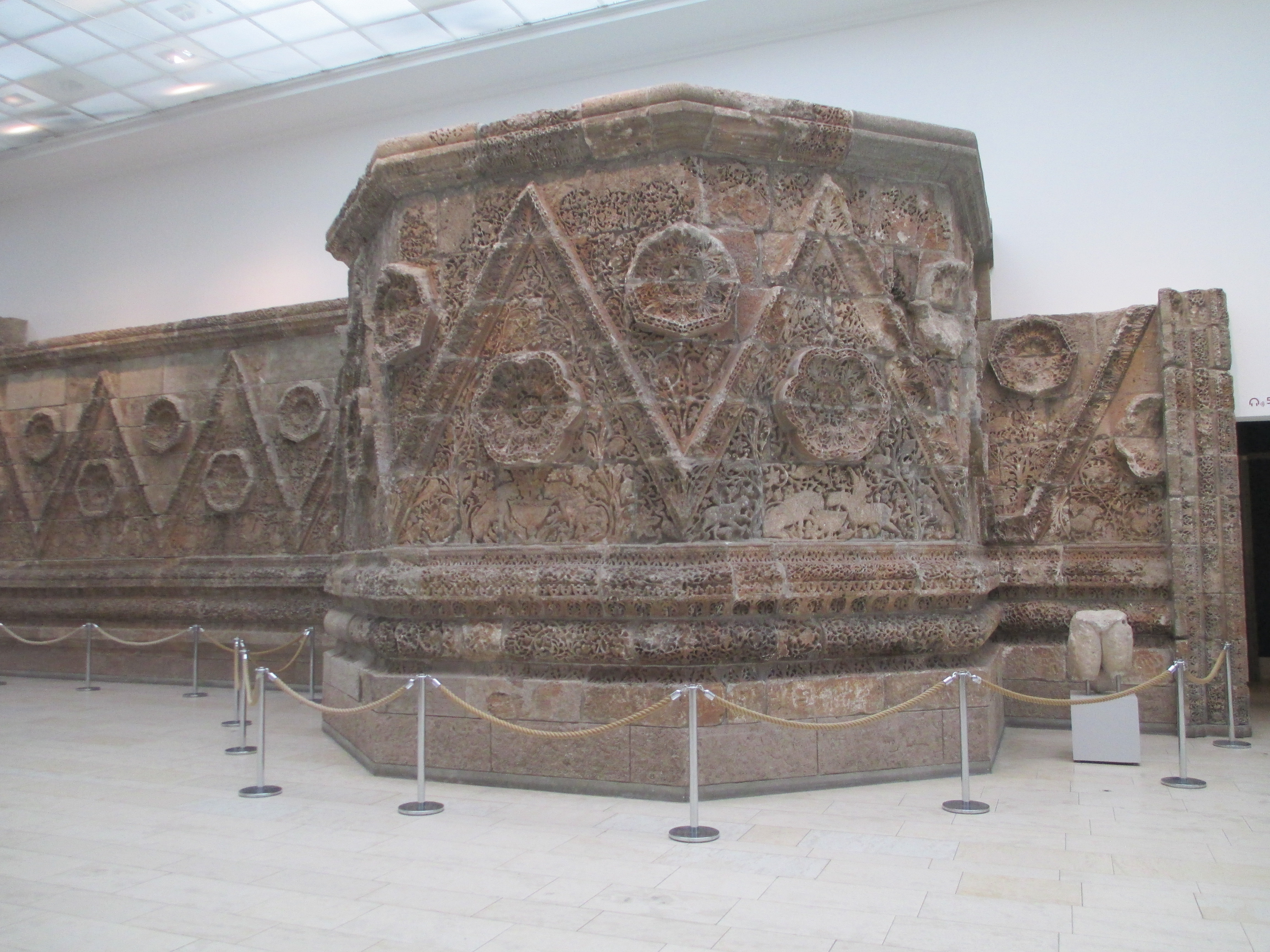 חזית ארמון משטה במוזיאון פרגמון